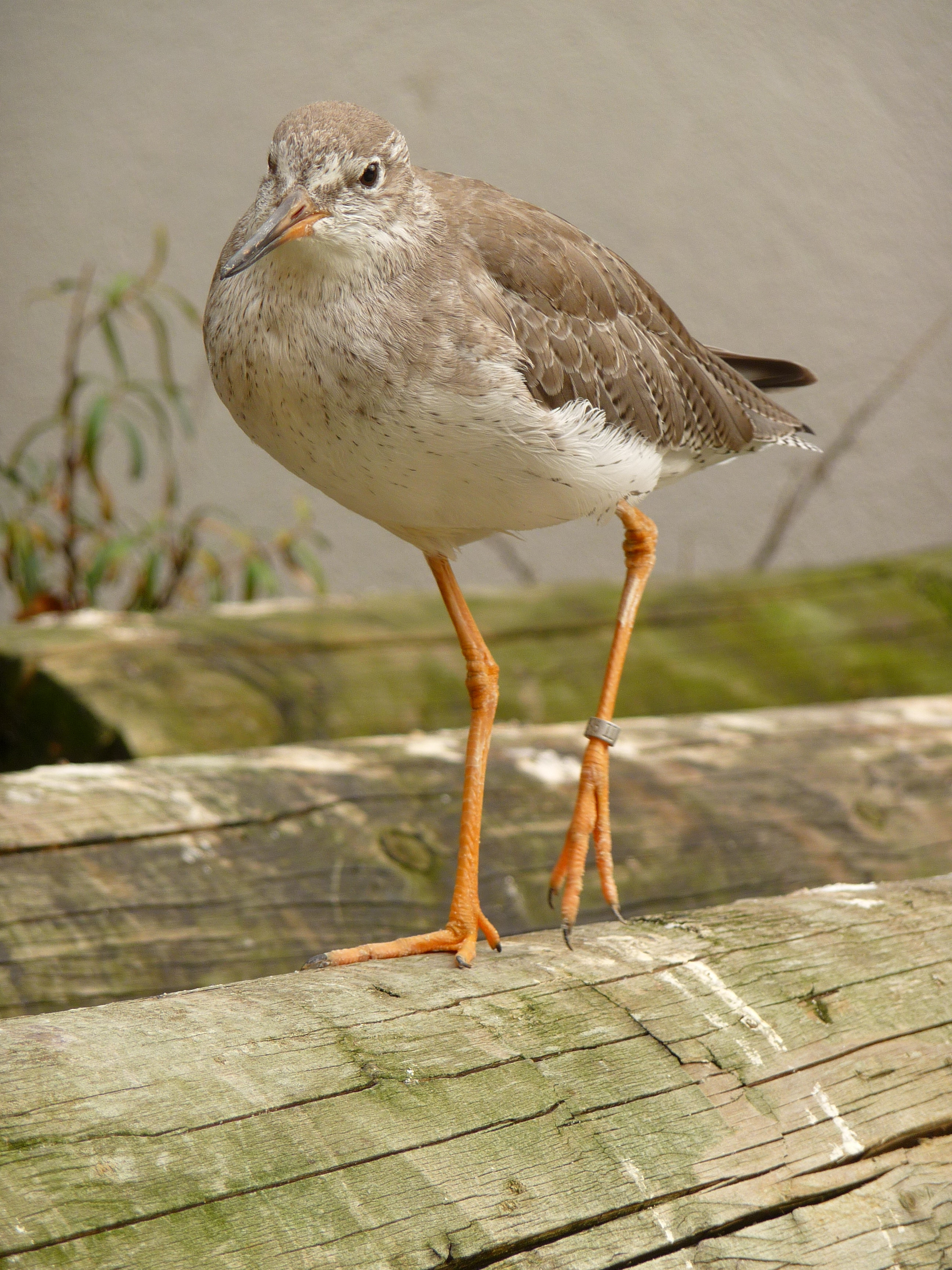 Rotschenkel (Tringa totanus)